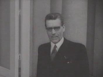 Leendert Antonie Donker in 1952